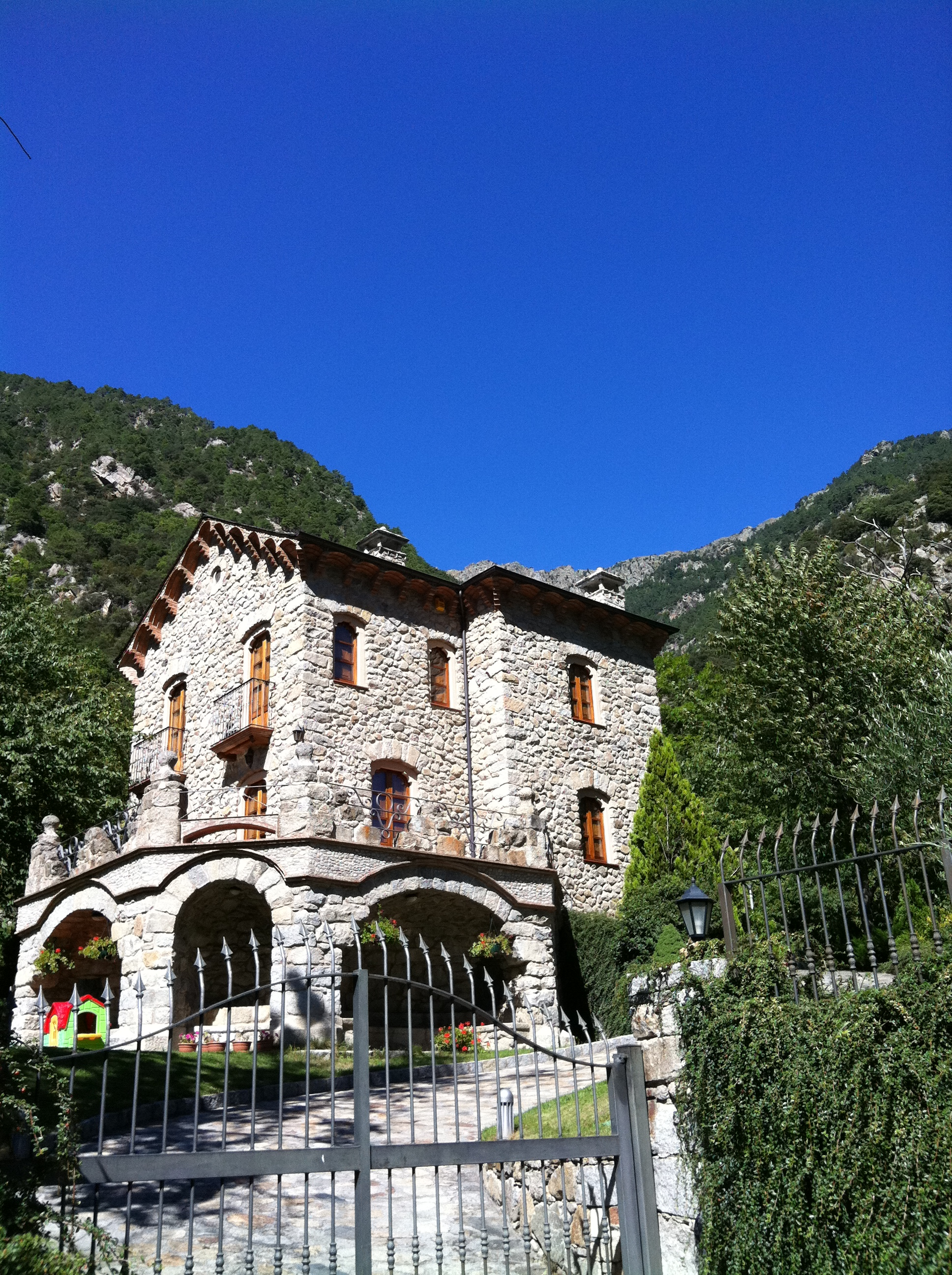 Casa dels Russos